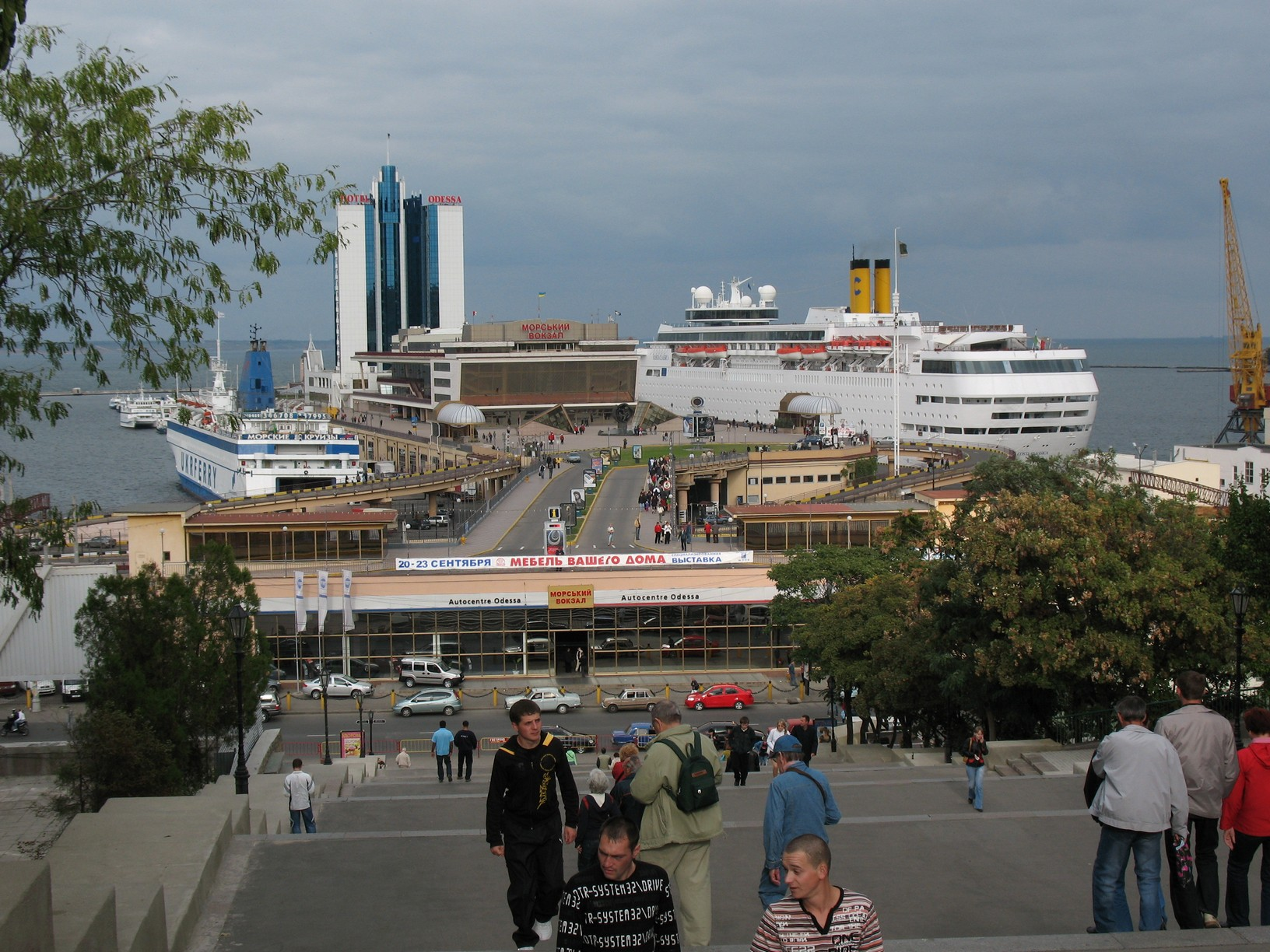 View on the port / Вид на порт (Новый мол)